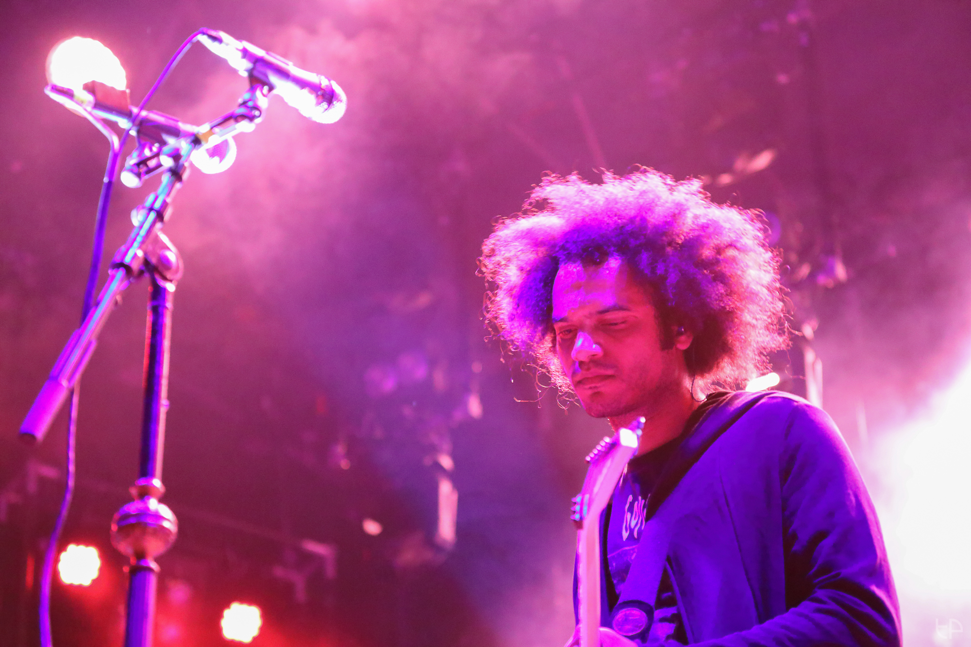 4L8A3170_web